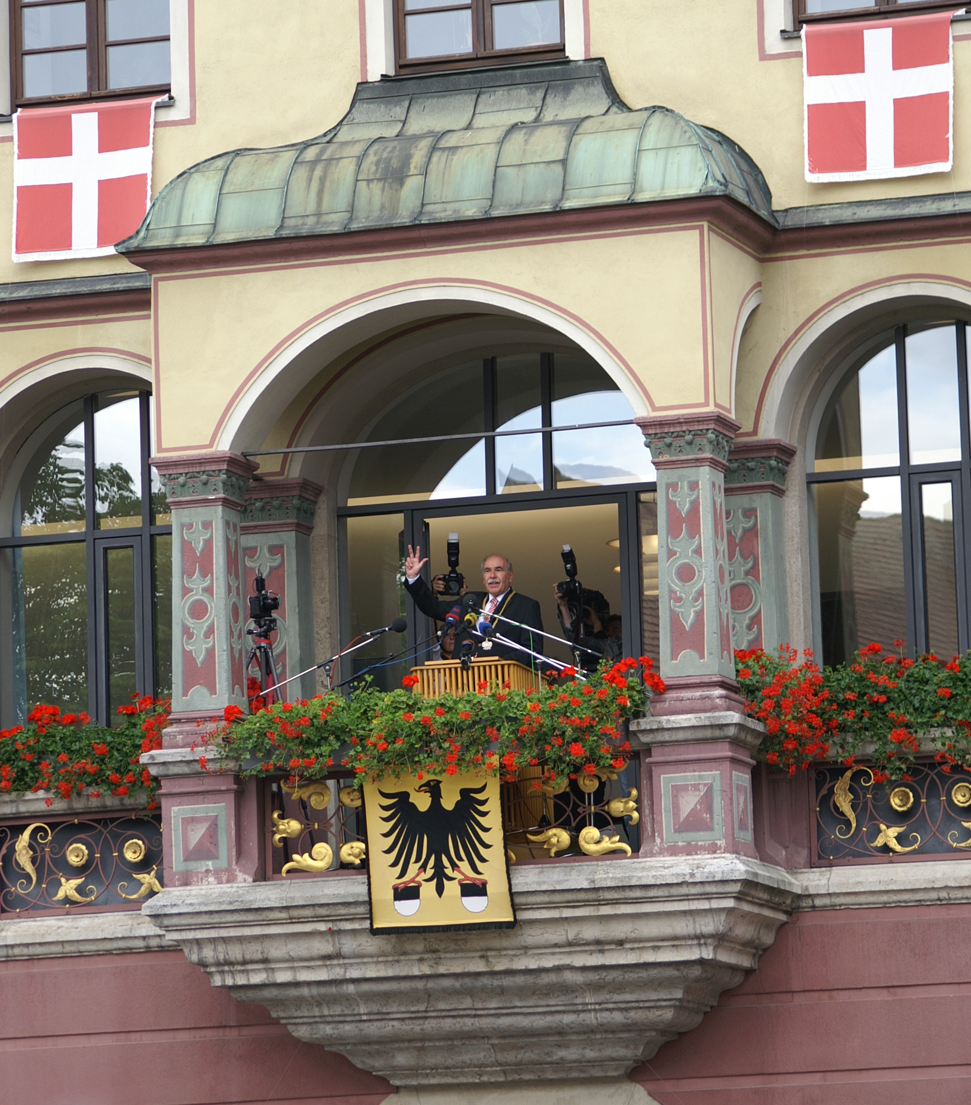 Oberbürgermeister Ivo Gönner bei seiner 18. Schwörrede seit 1992. Nach altem Brauch hält der Ulmer Oberbürgermeister am Schwörmontag eine Ansprache und schwört im Anschluß daran, zum Klang der Schwörglocke, "Reichen und Armen ein gemeiner Mann zu sein in den gleichen, gemeinsamen und redlichen Dingen, ohne Vorbehalt".